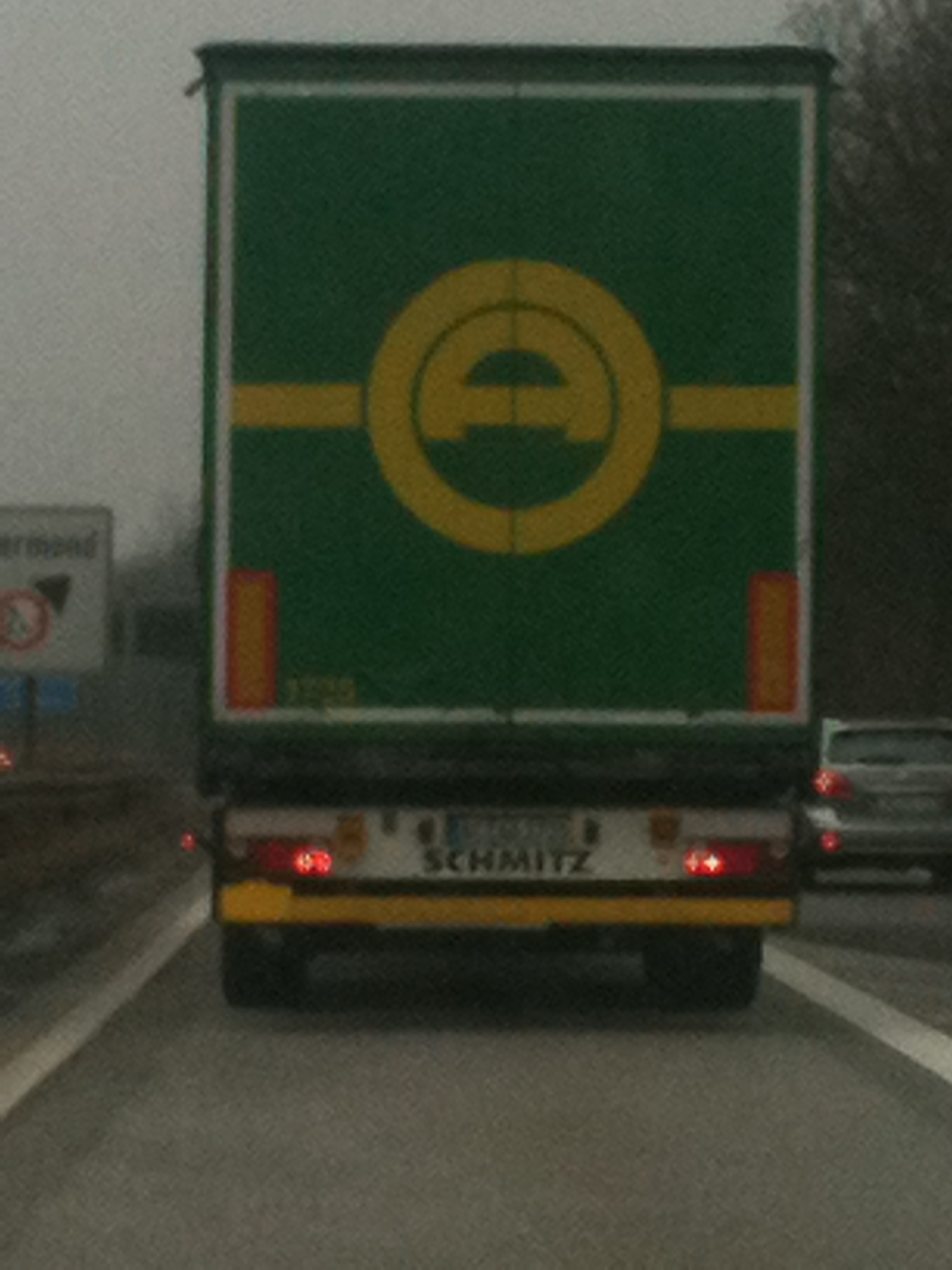 Spedition Adam Offergeld